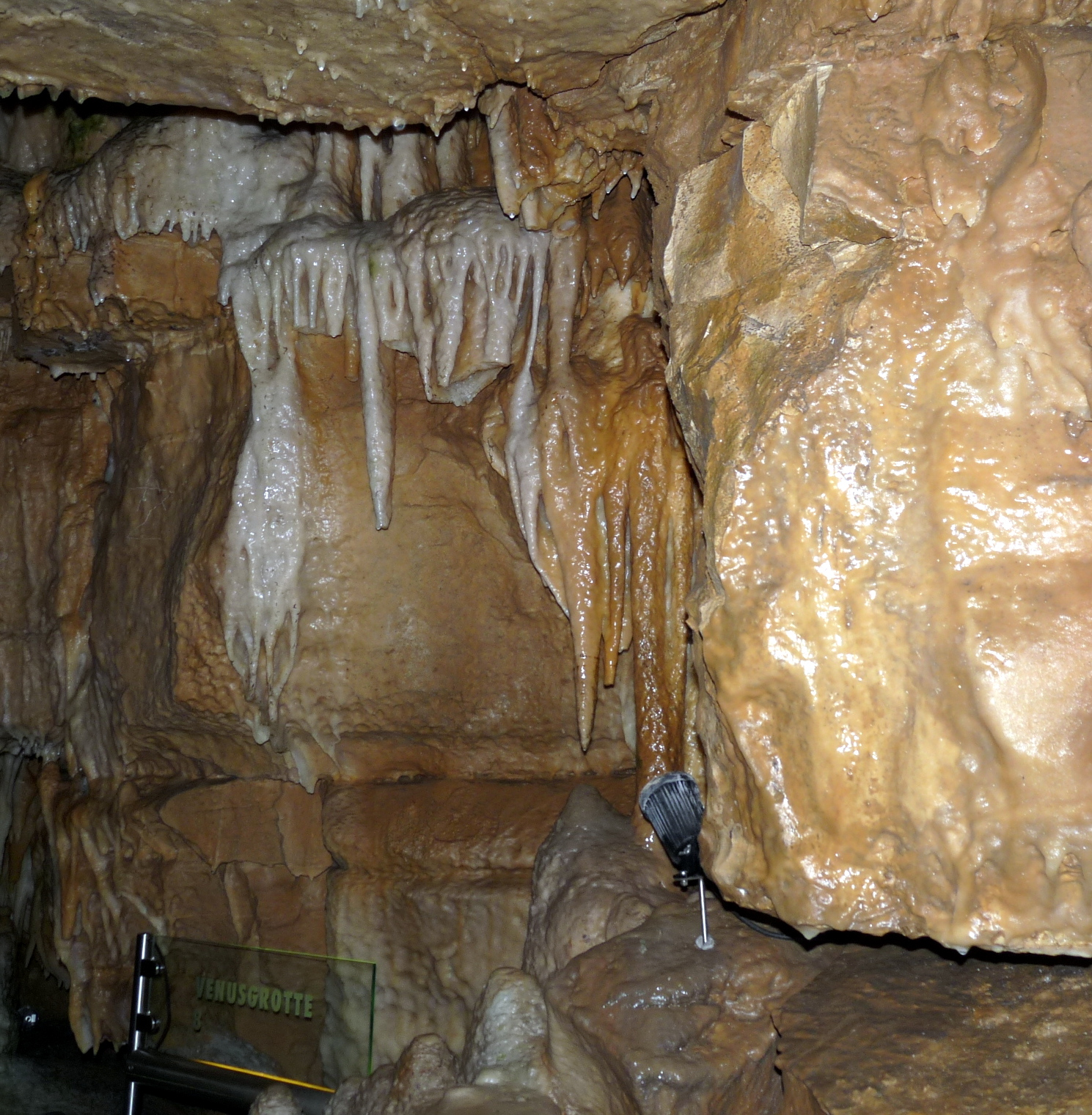 Binghöhle bei Streitberg